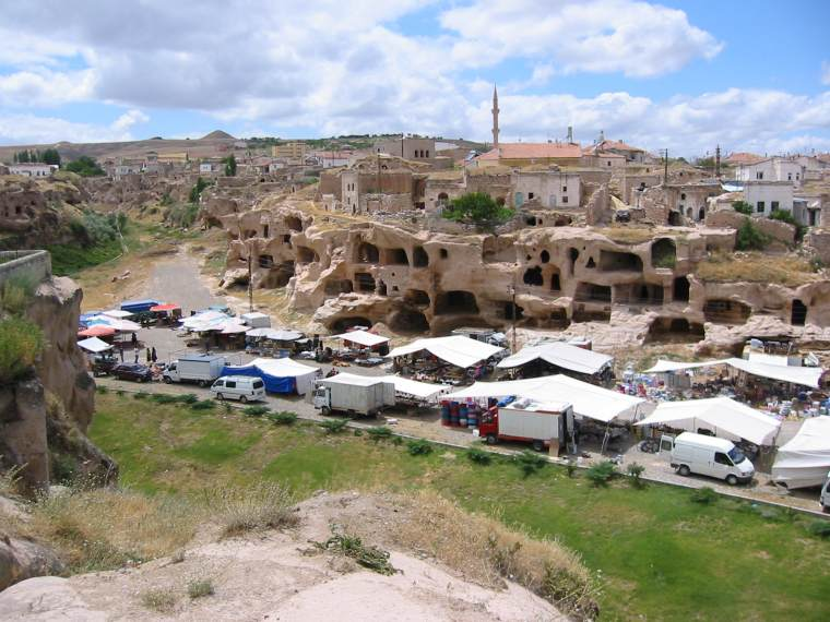 Özkonak manzarası. (A view from Özkonak in Avanos, Nevşehir, Cappadocia, Turkey).